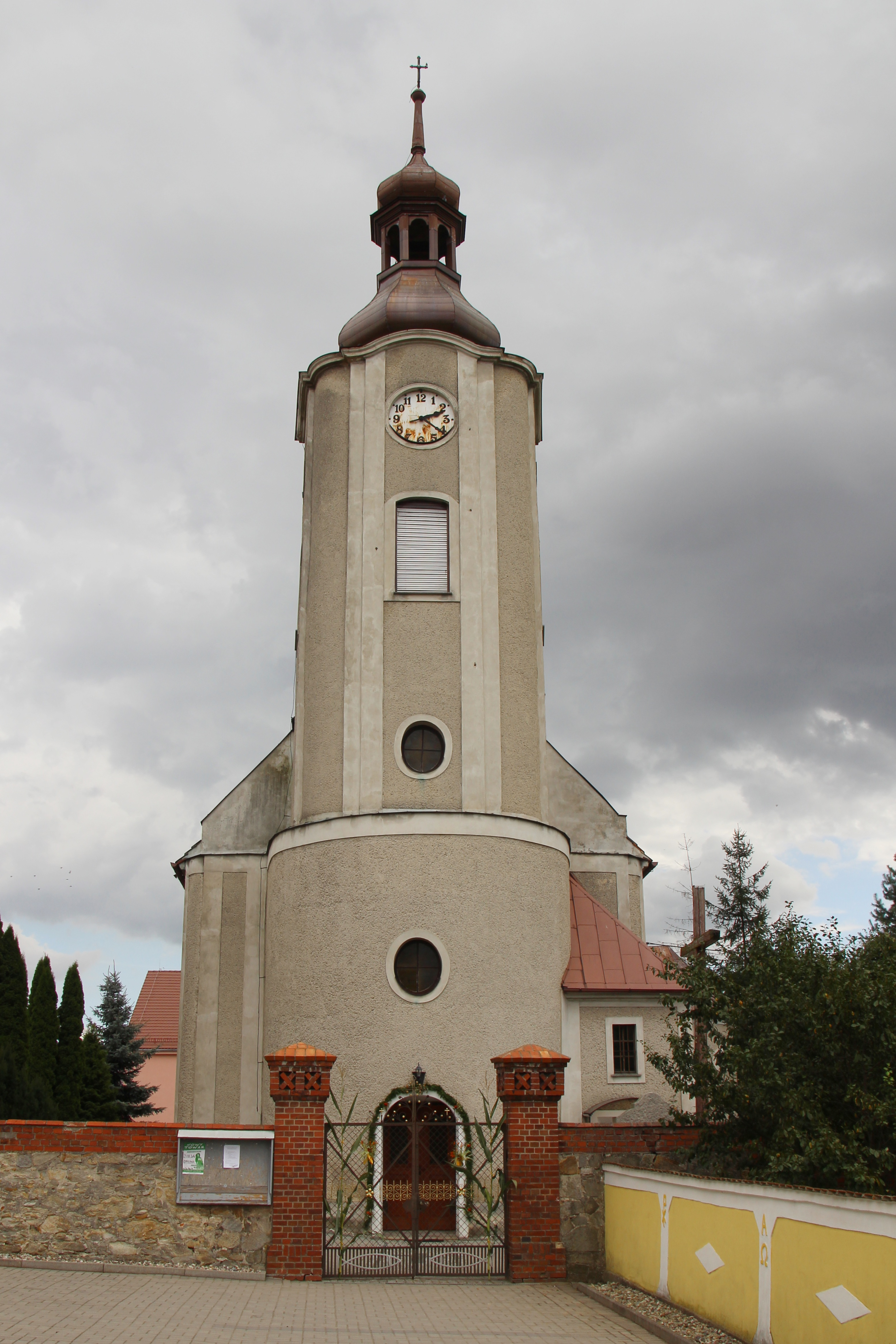 Goworowice – wieś w Polsce położona w województwie opolskim, w powiecie nyskim, w gminie Kamiennik.